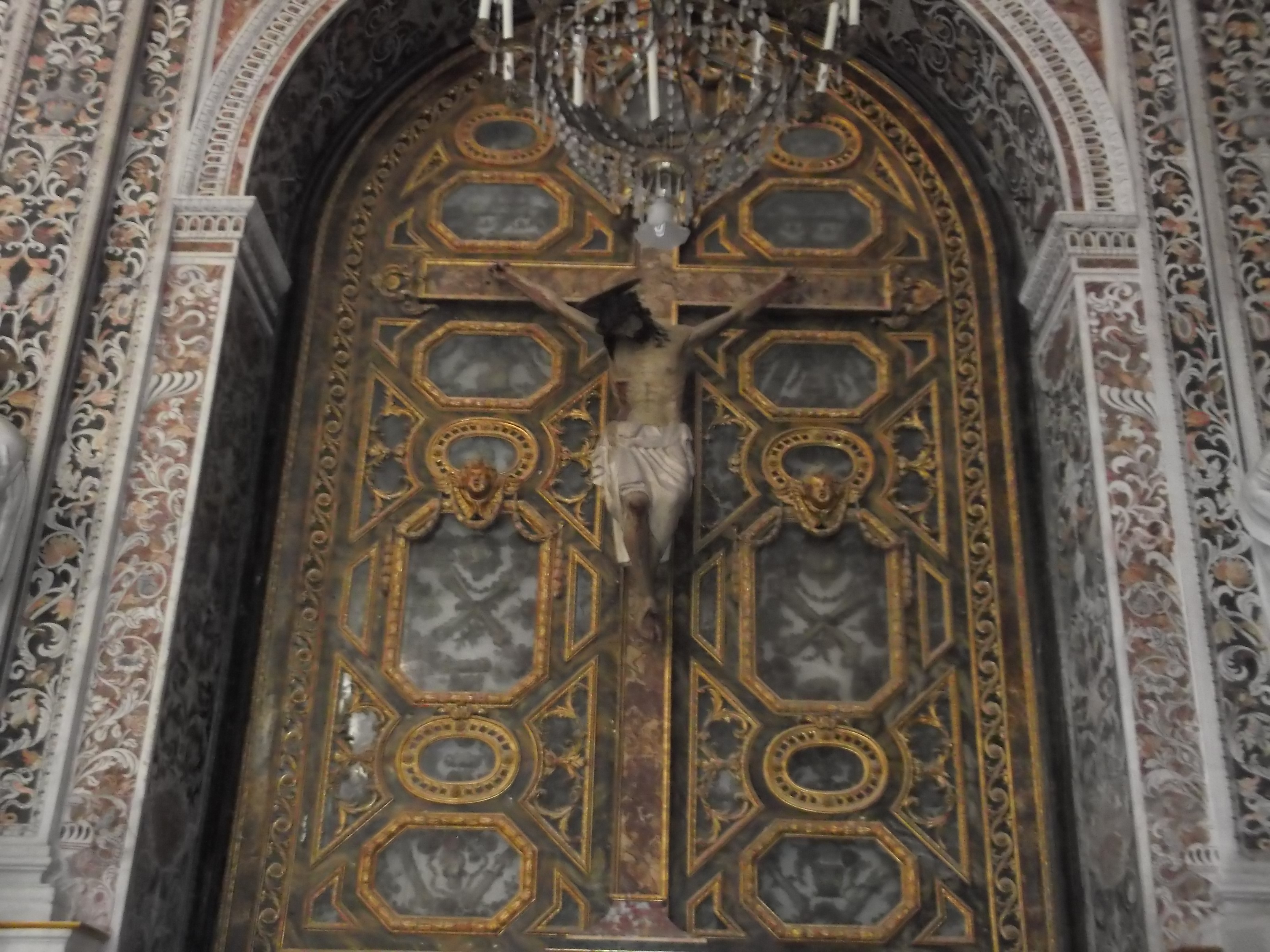 Crocifisso ligneo del XVIII secolo.